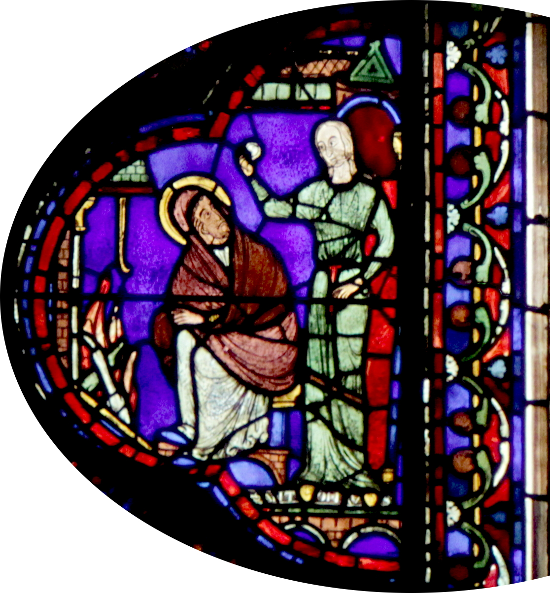 Excerpts from File:Vitrail Chartres-030-d rectifié.jpg